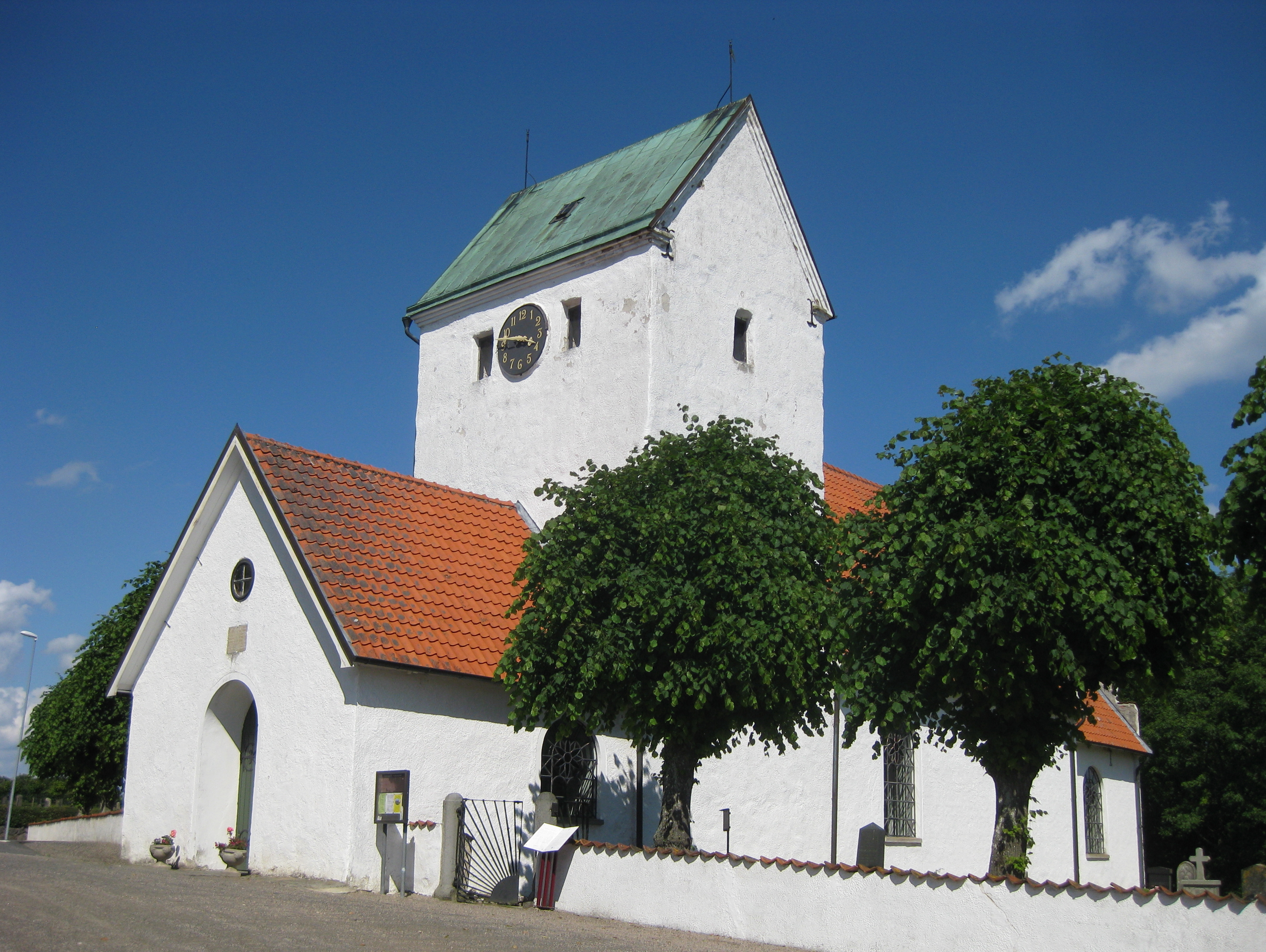 Maglehems kyrka från söder